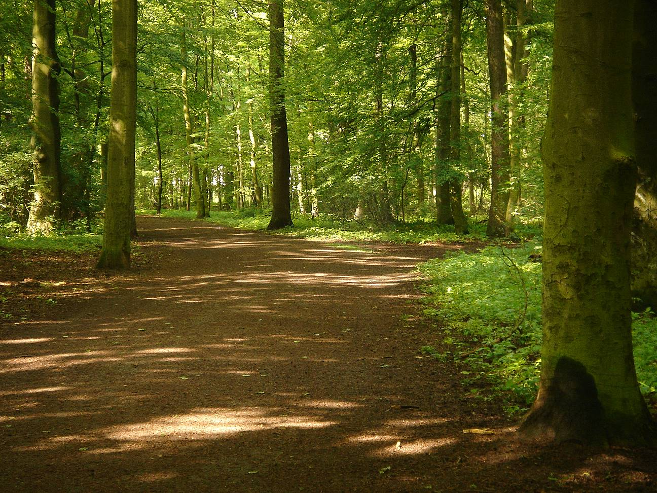 Hannover, Eilenriede